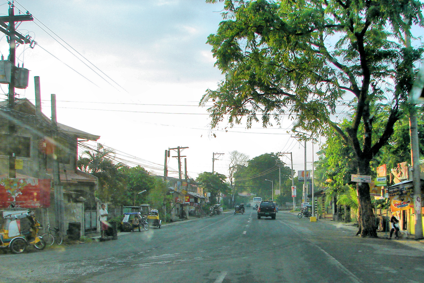 Santa Barbara, Pangasinan, Philippines